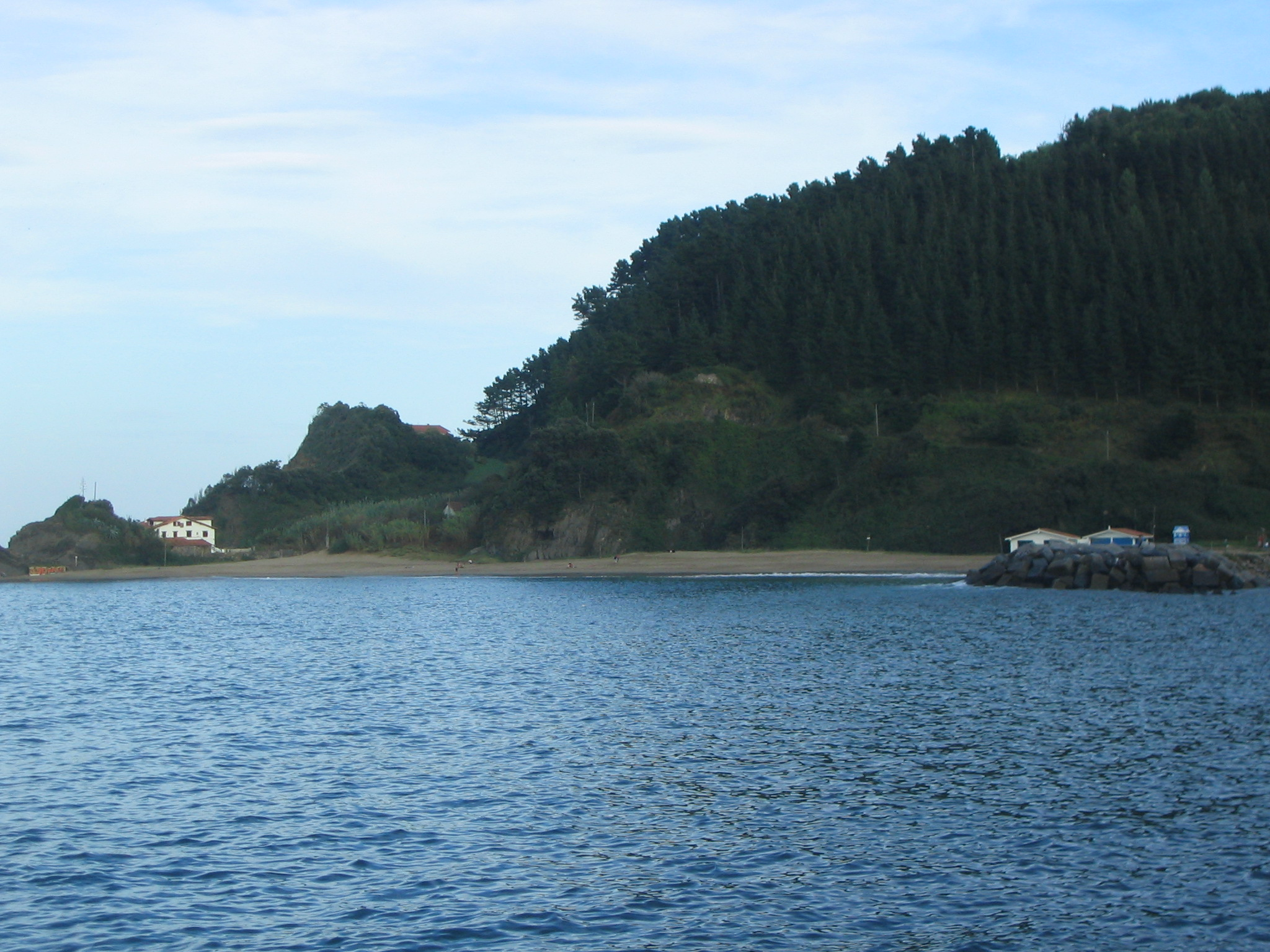 Playa de Saturraran en Mutriku, Guipúzcoa, País Vasco, España.